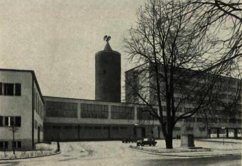 Neues Regierungsgebäude und Schlossturm in Oppeln